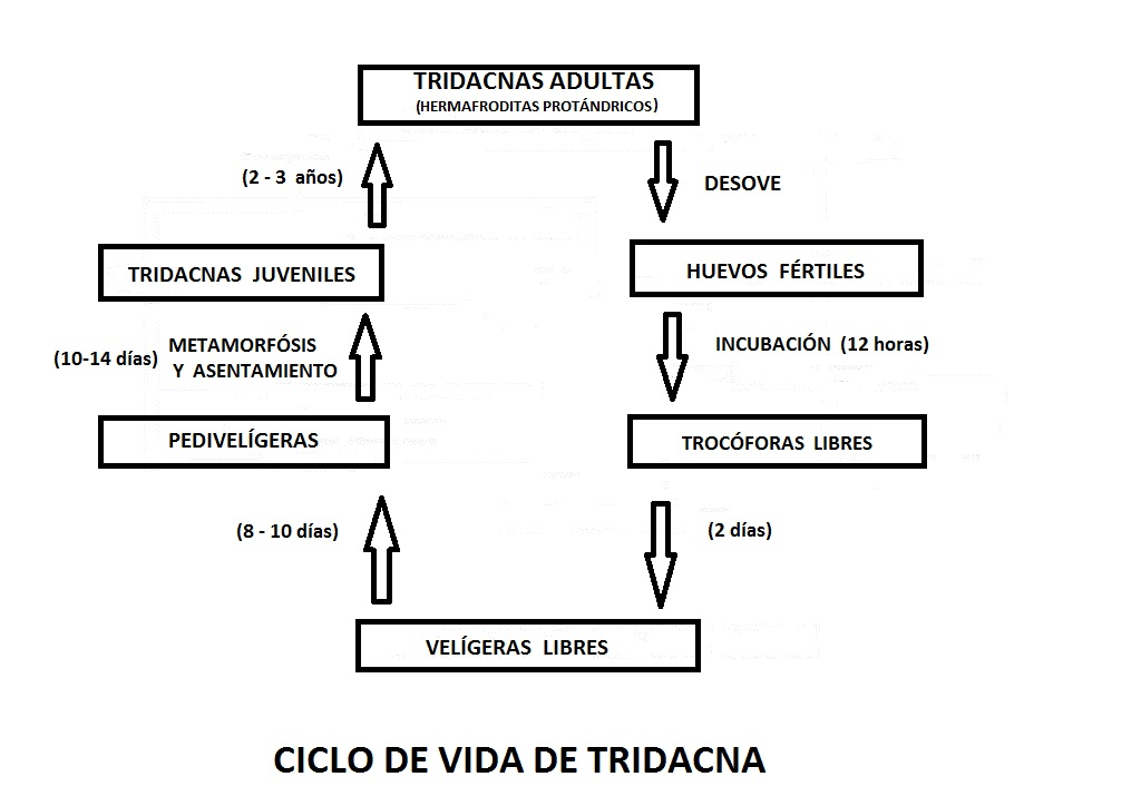 Ciclo de vida del género Tridacna